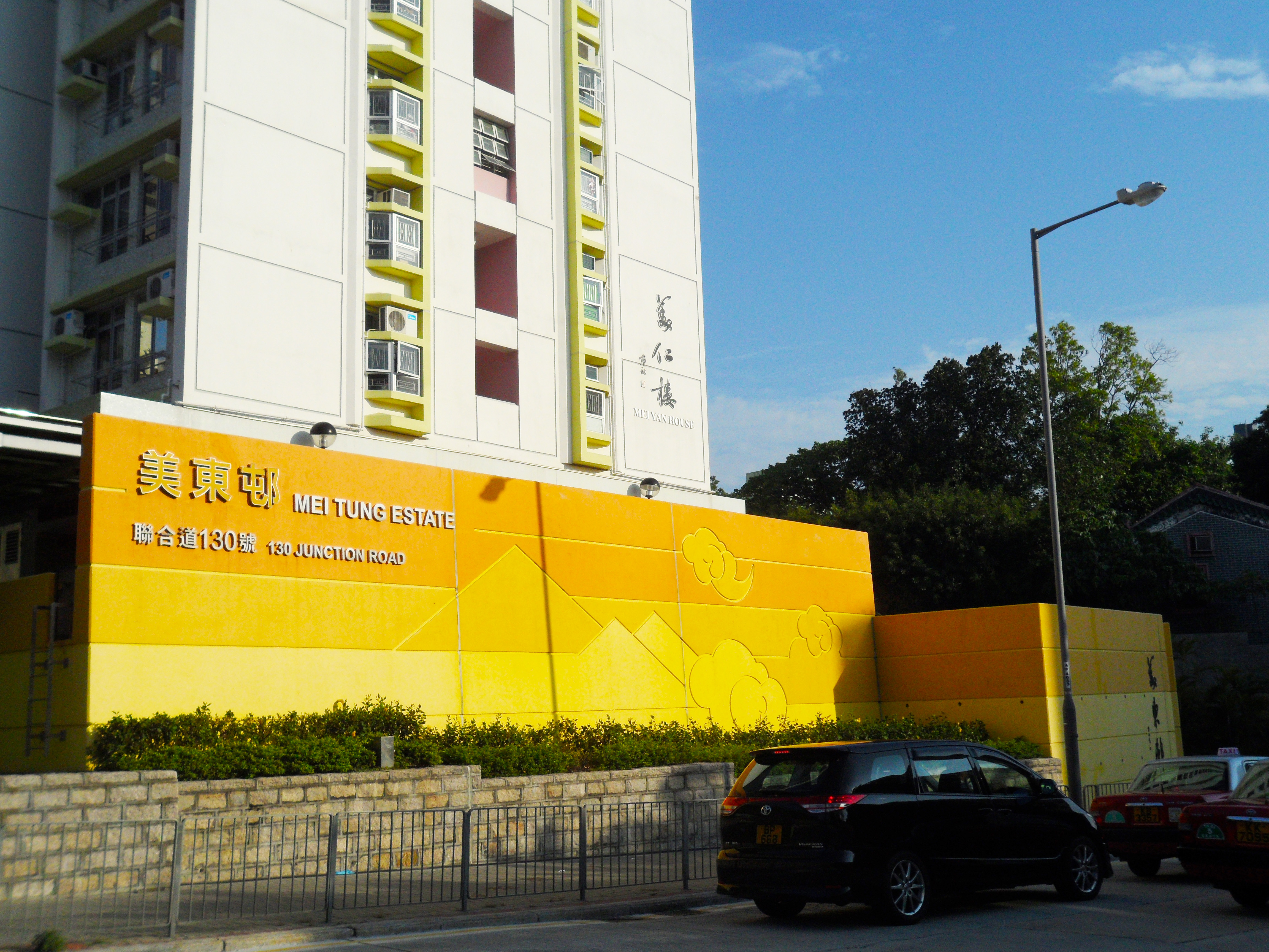 美東邨的牌坊